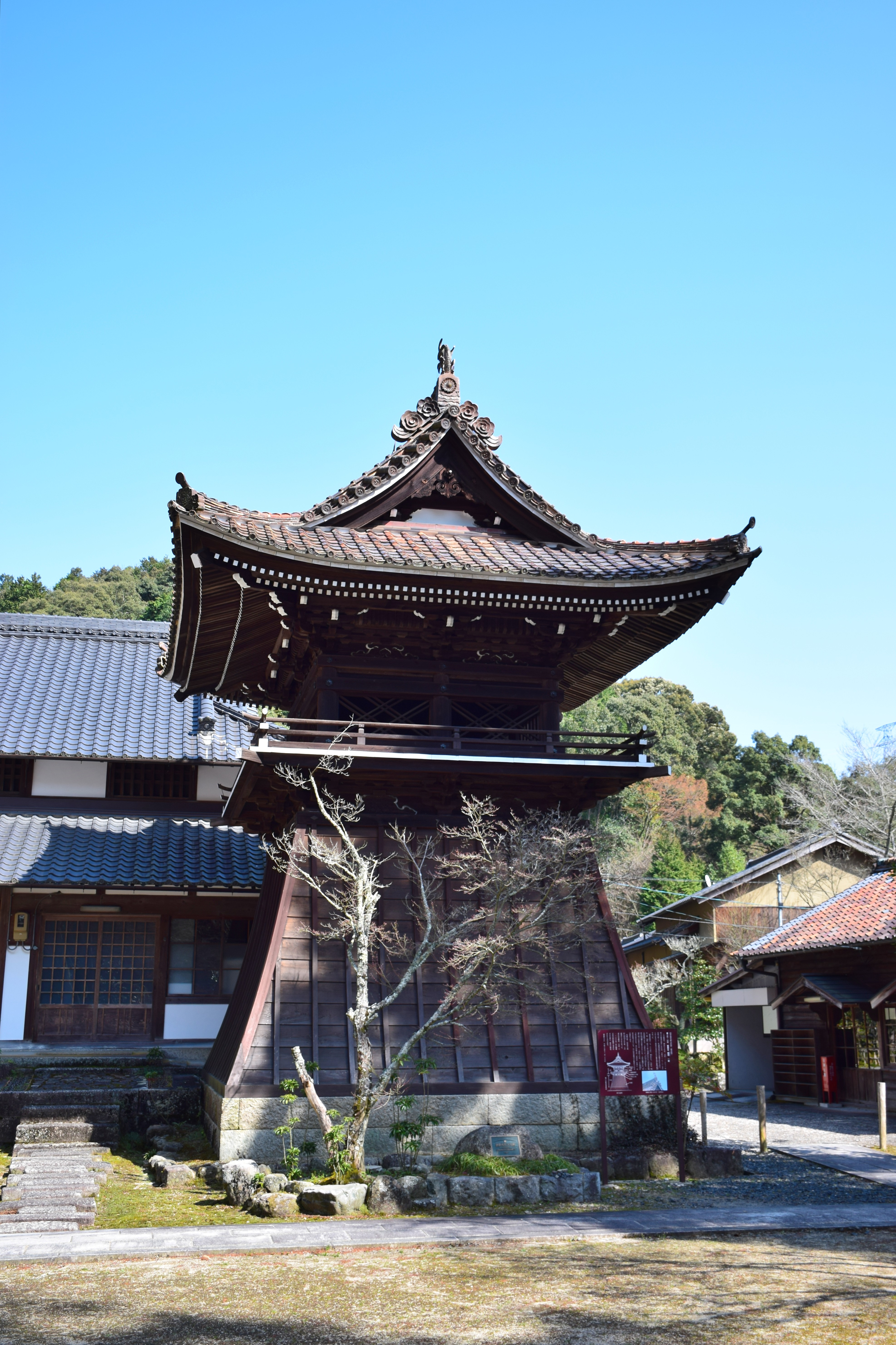 雲興寺鐘楼